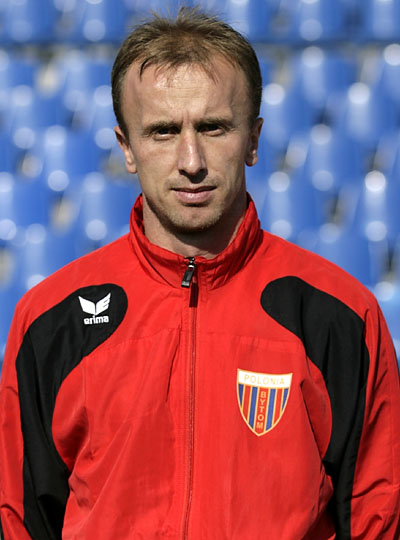 Jacek Trzeciak - piłkarz Polonii Bytom